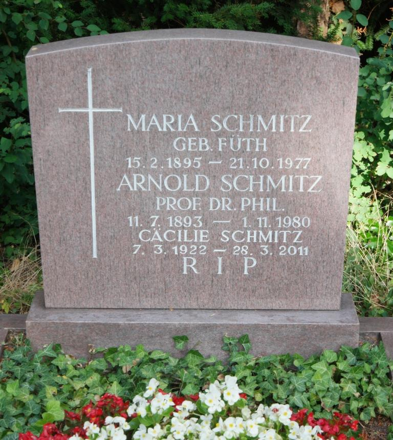 Grab des Musikwissenschaftlers, Pianisten und Komponisten Arnold Schmitz, 1893-1980, auf dem Hauptfriedhof Mainz